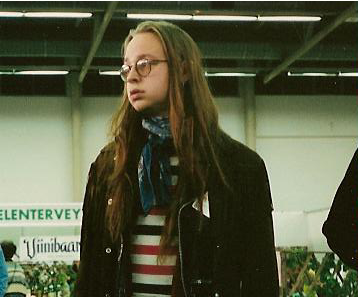 Kuva Kivi Larmolasta jostain messuilta, Helsinki? Turku? Julkisessa tilassa otettu, tiedoston lataaja itse ottanut.